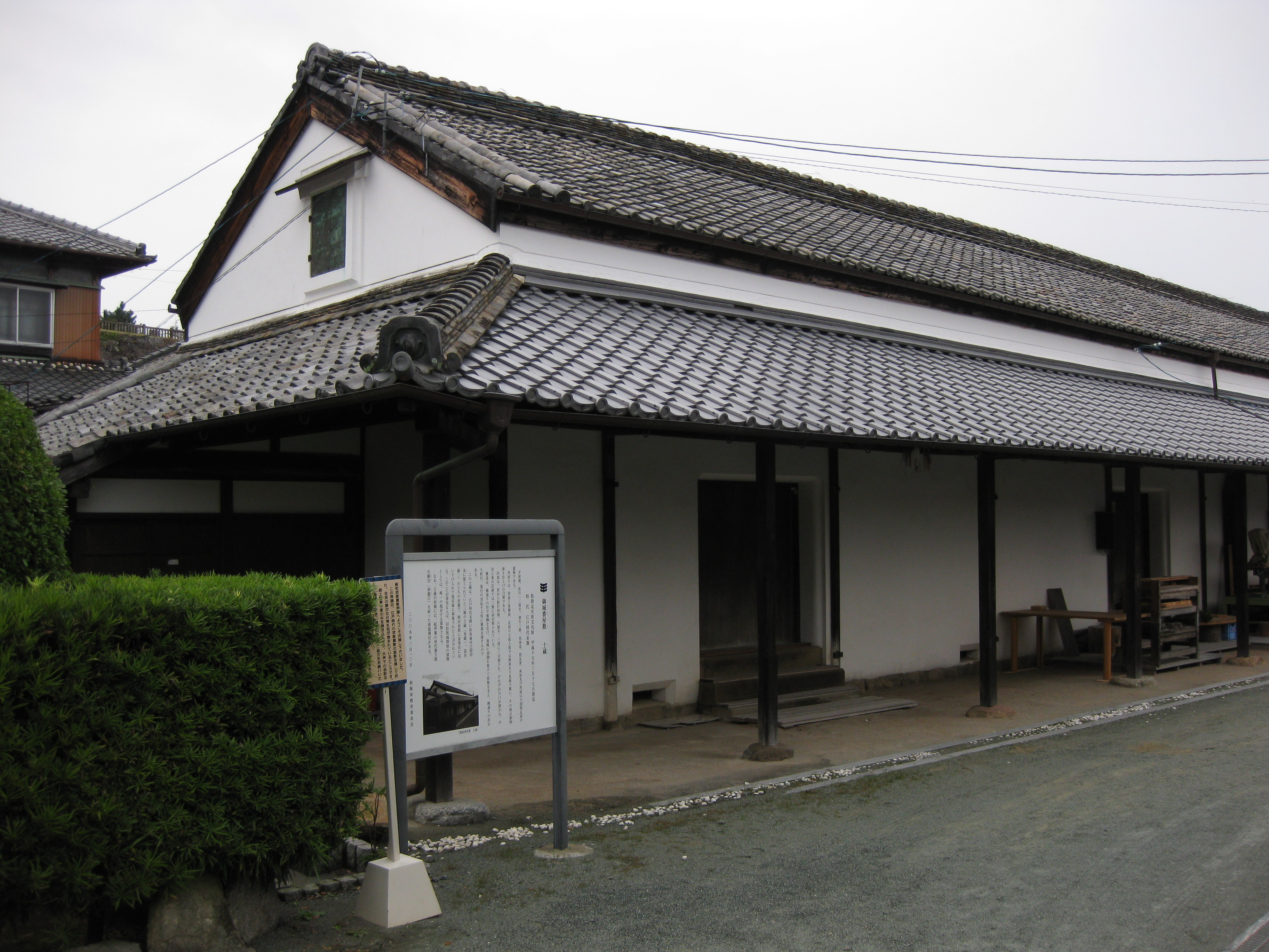 御城番屋敷近影